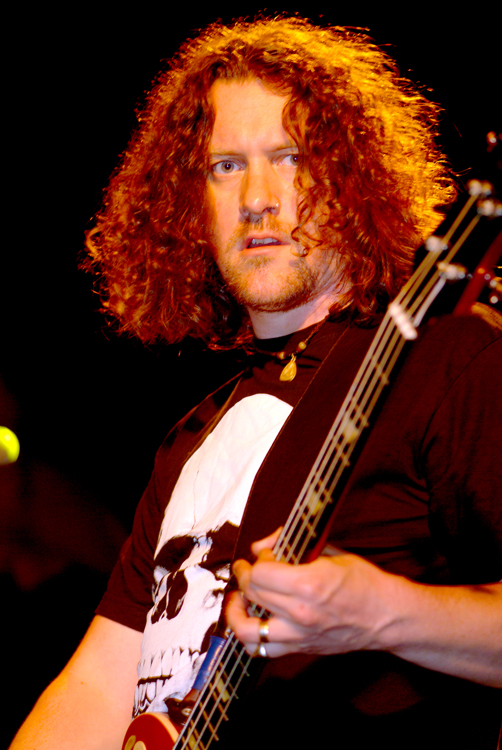 El músico Brian Hogan, miembro de la banda irlandesa KILA, durante el festival SonCelta en Porto Do Son, Galicia - España